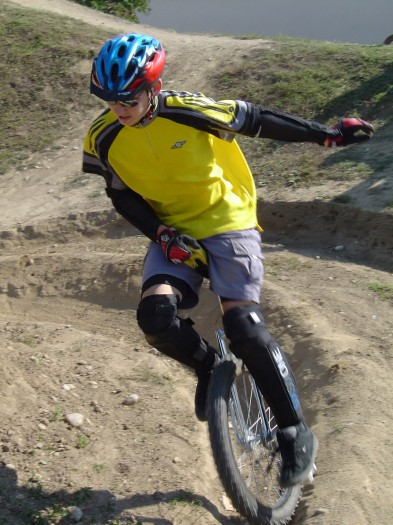 Municycle Haid; 2003